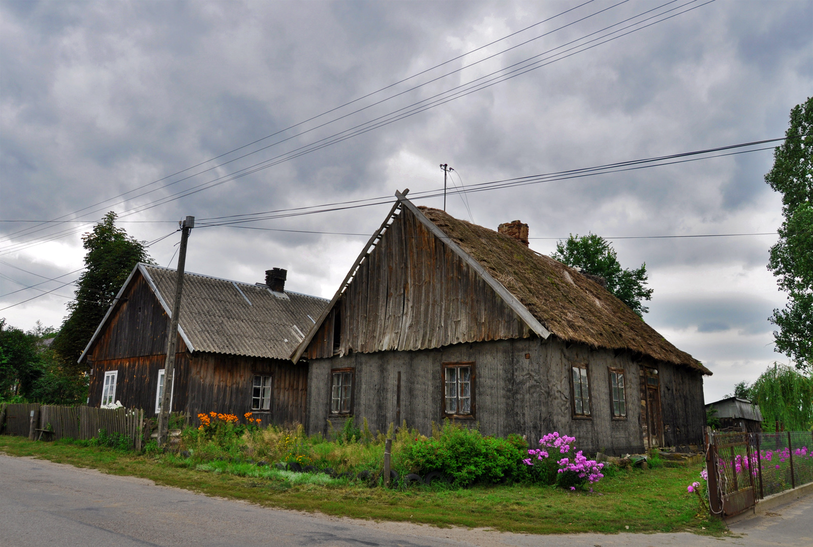 Mścichy - Budynki mieszkalne